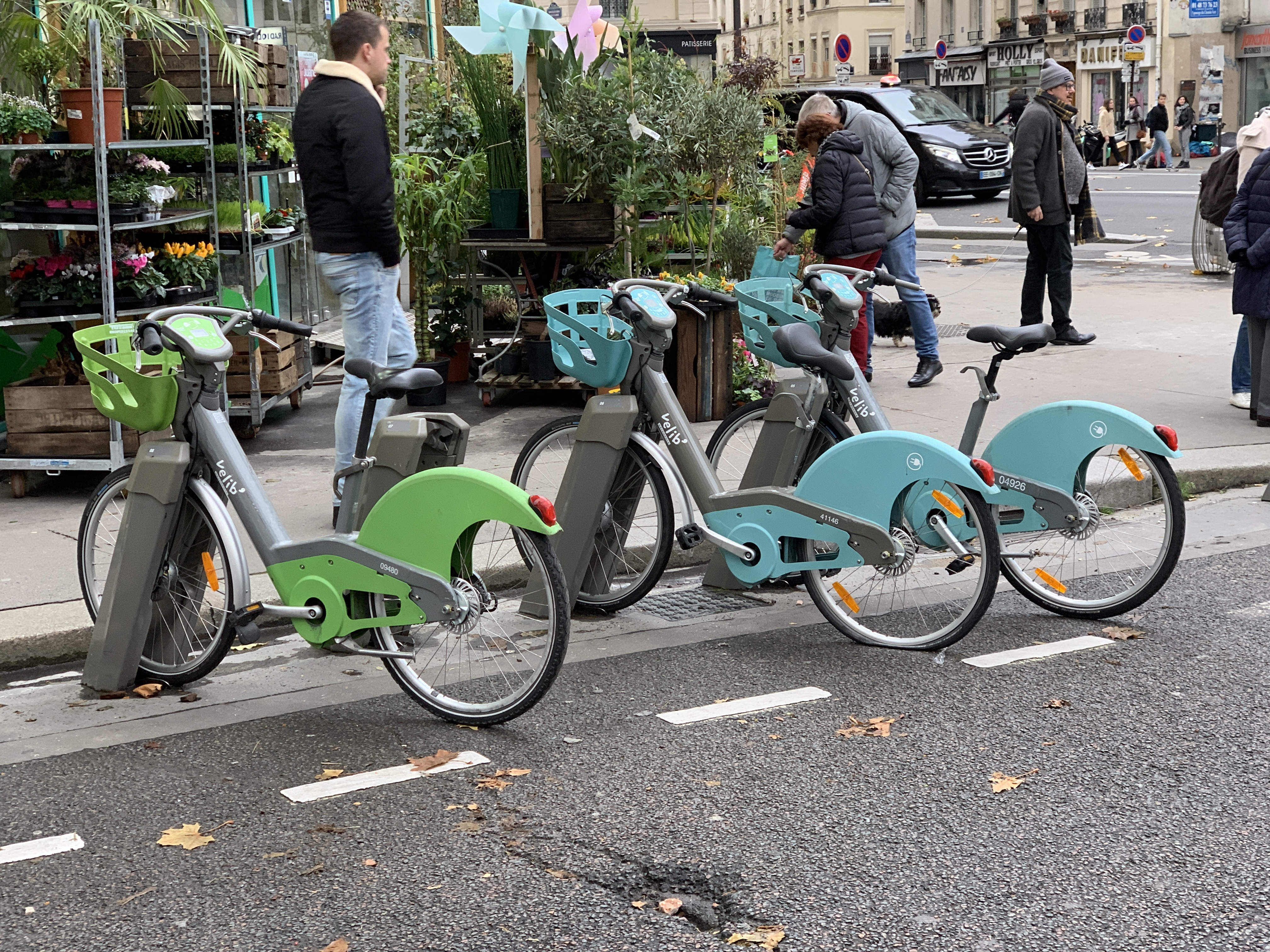 Station Vélib' Métropole Square Saint-Ambroise, Paris.